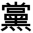 Дан фамилия